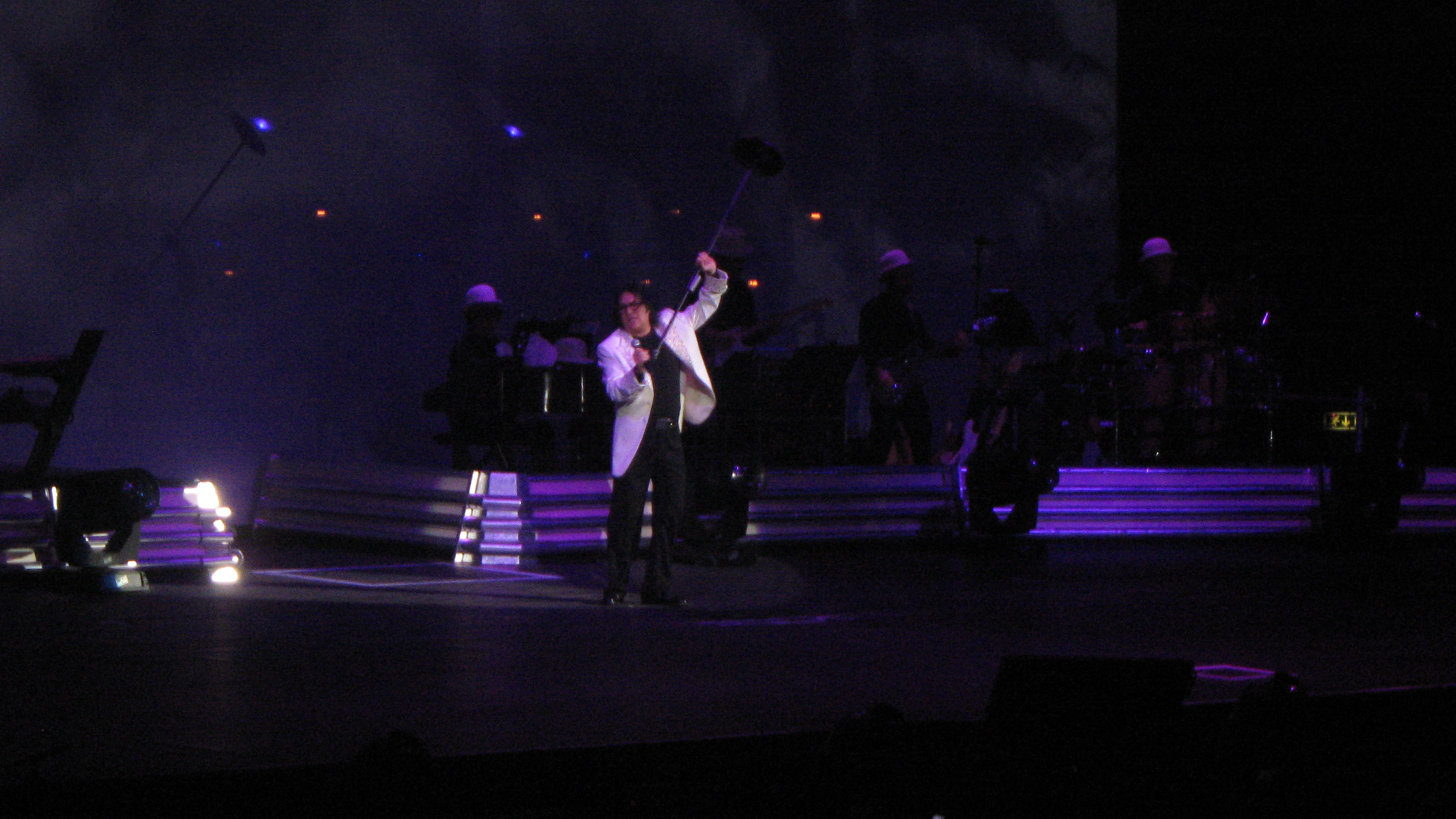 Foto del concerto ZeroNoveTour nel 2009 al PalaLottomatica